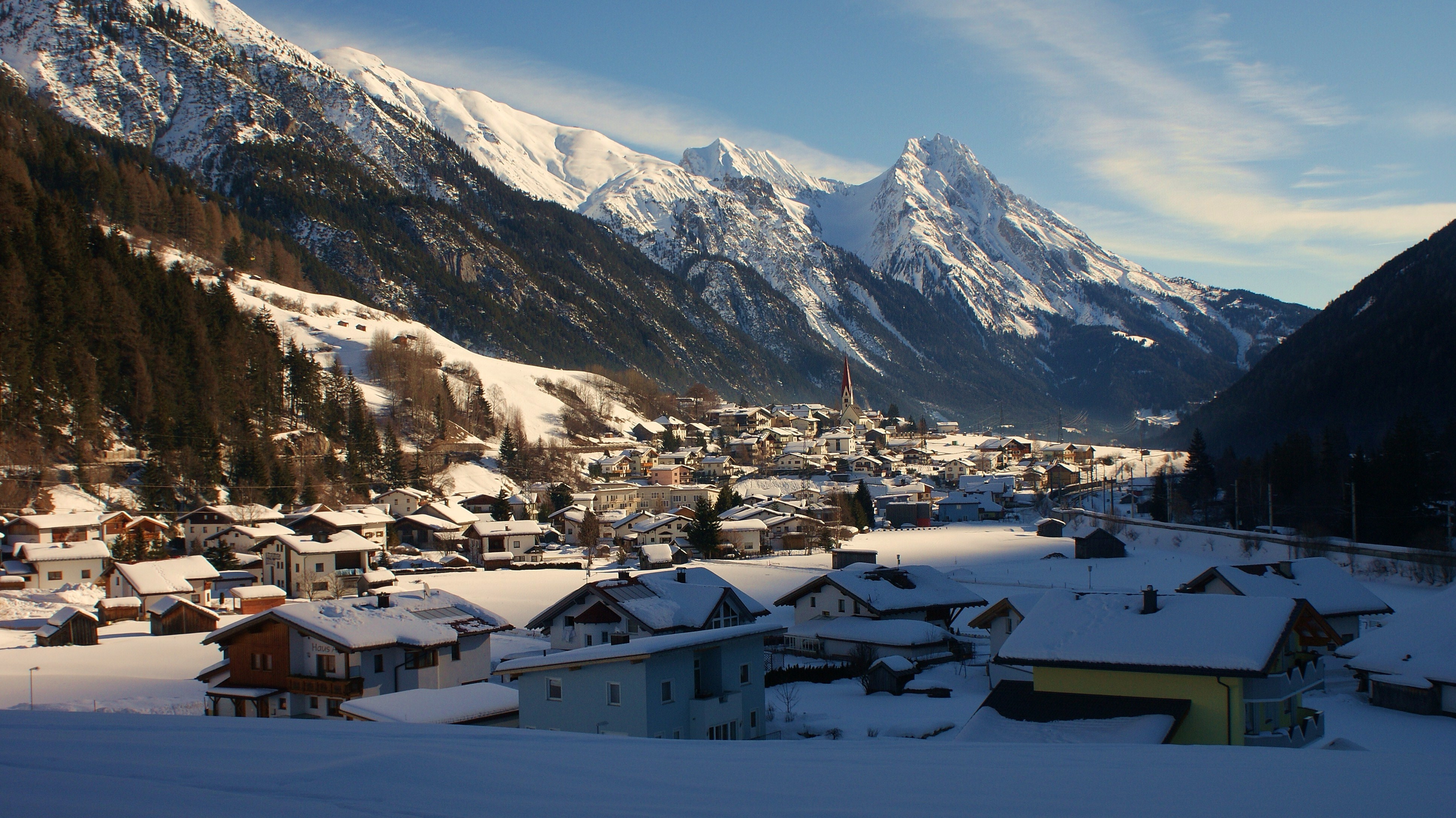 Der Ort Pettneu am Arlberg in Österreich